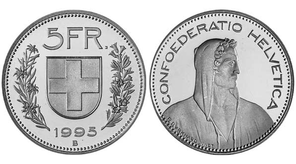 5 CHF / Fünffranken